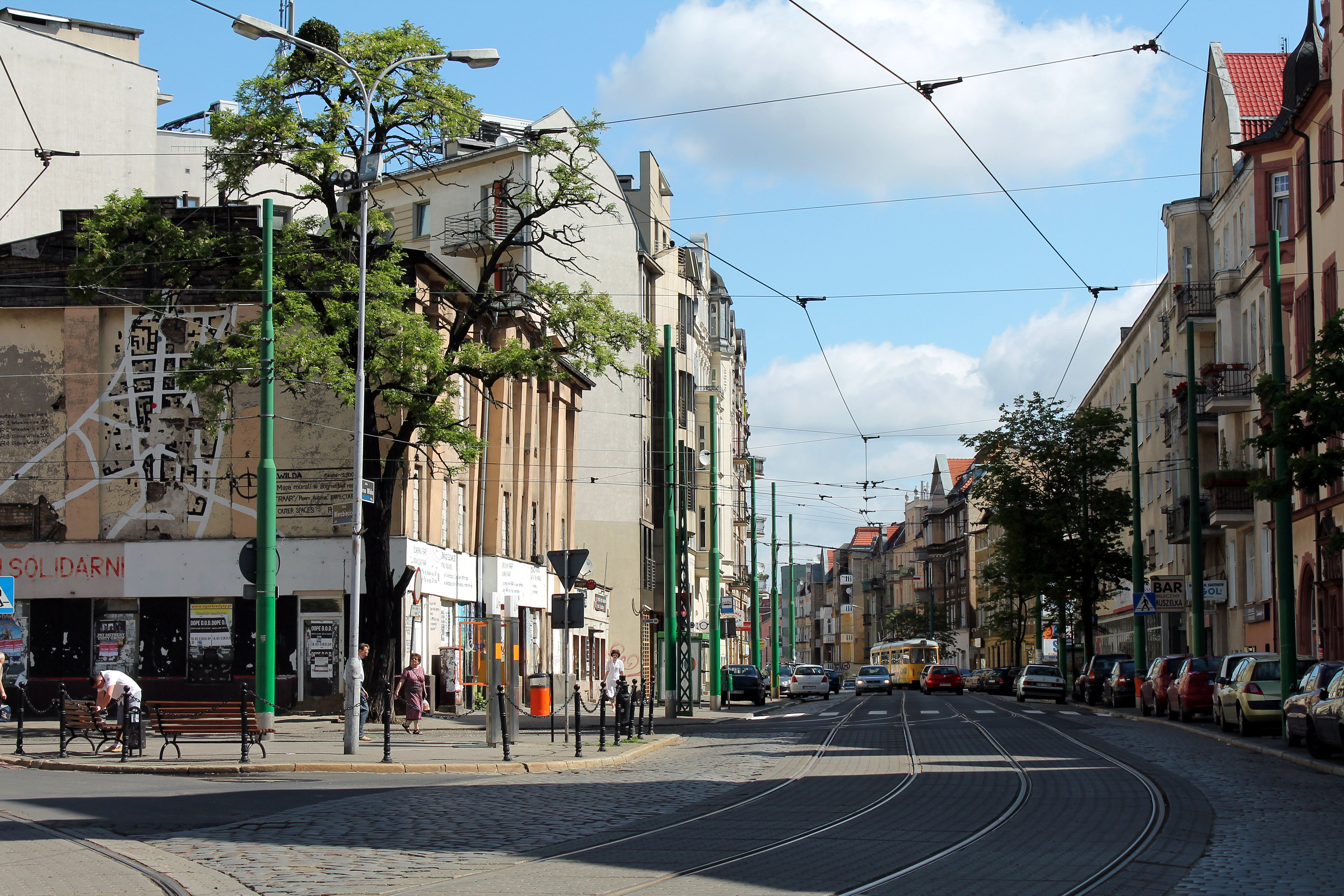 Ulica Górna Wilda w Poznaniu